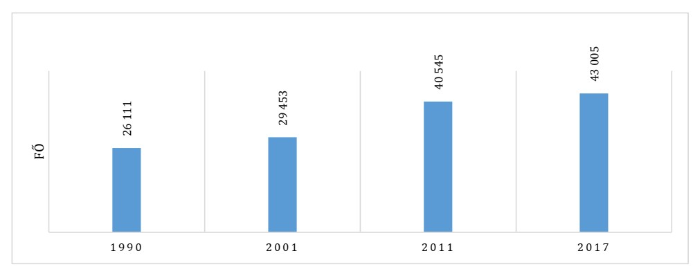 Dunakeszi lakosainak száma (1990-2017)